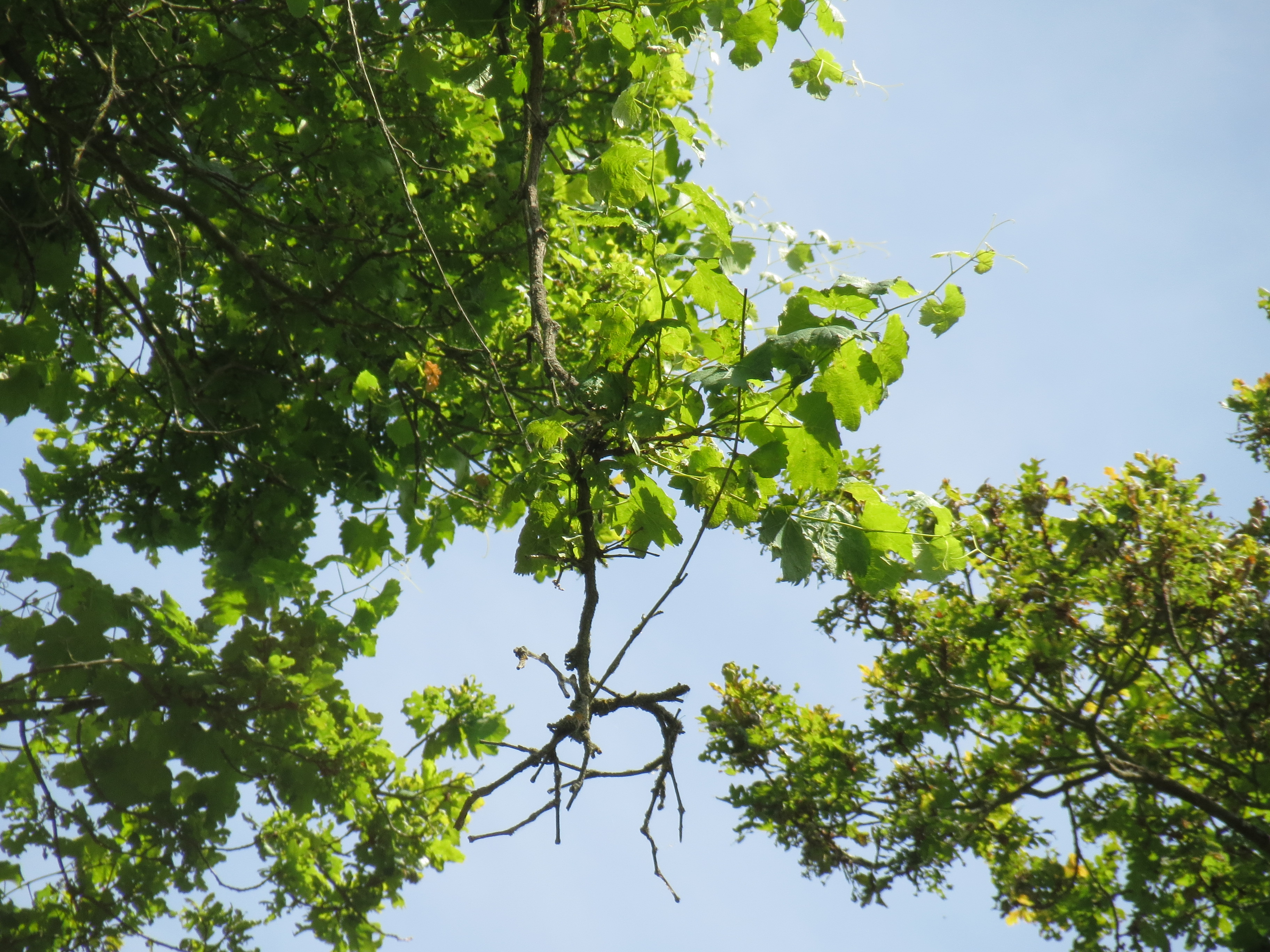 Die sehr seltene Wild-Rebe (Vitis vinifera subsp. sylvestris) im Naturschutzgebiet Ketscher Rheininsel